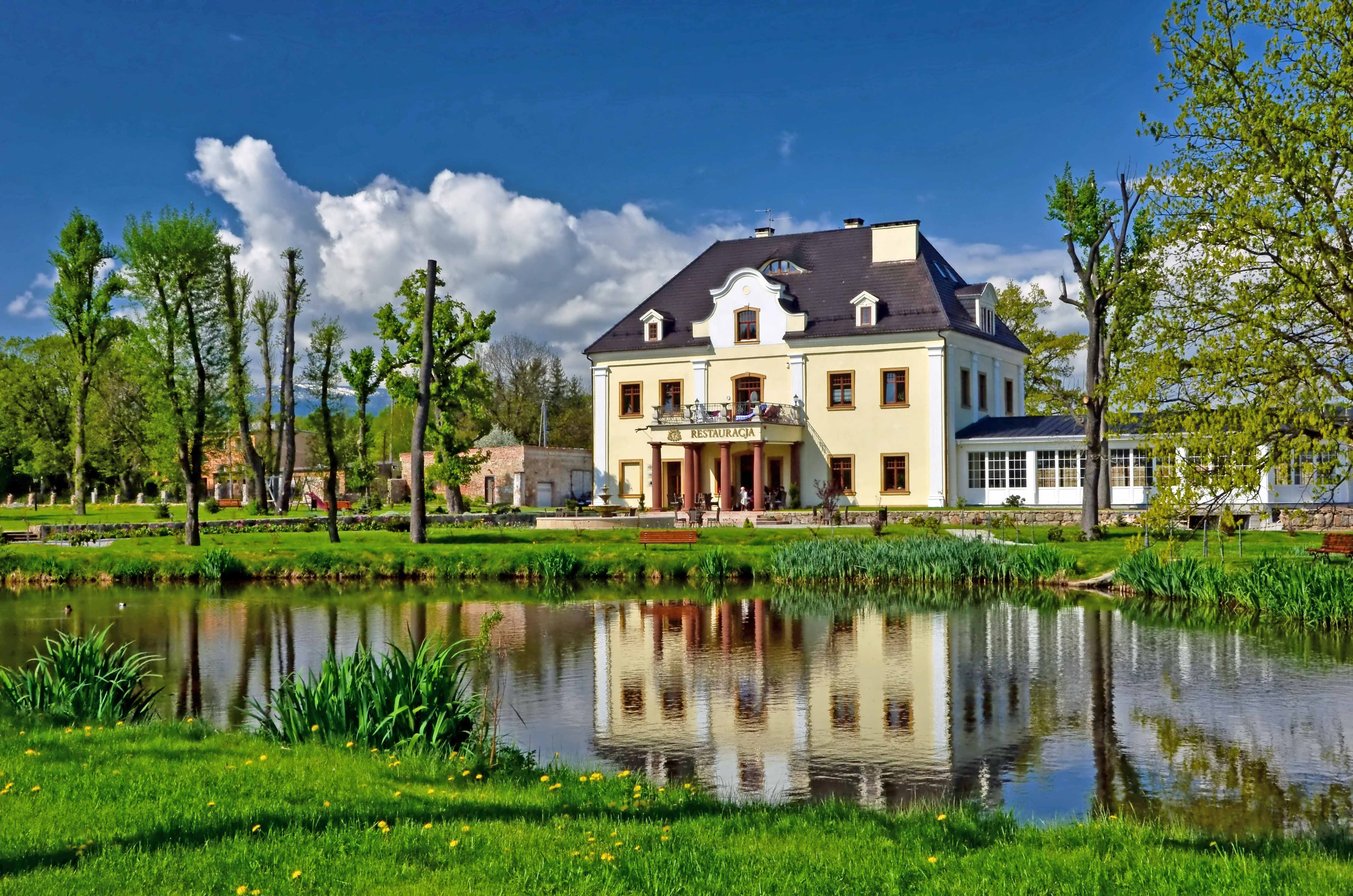 Pałac na Wodzie w dolnej części Staniszowa (zabytek nr A/785/600/J z dn. 27)